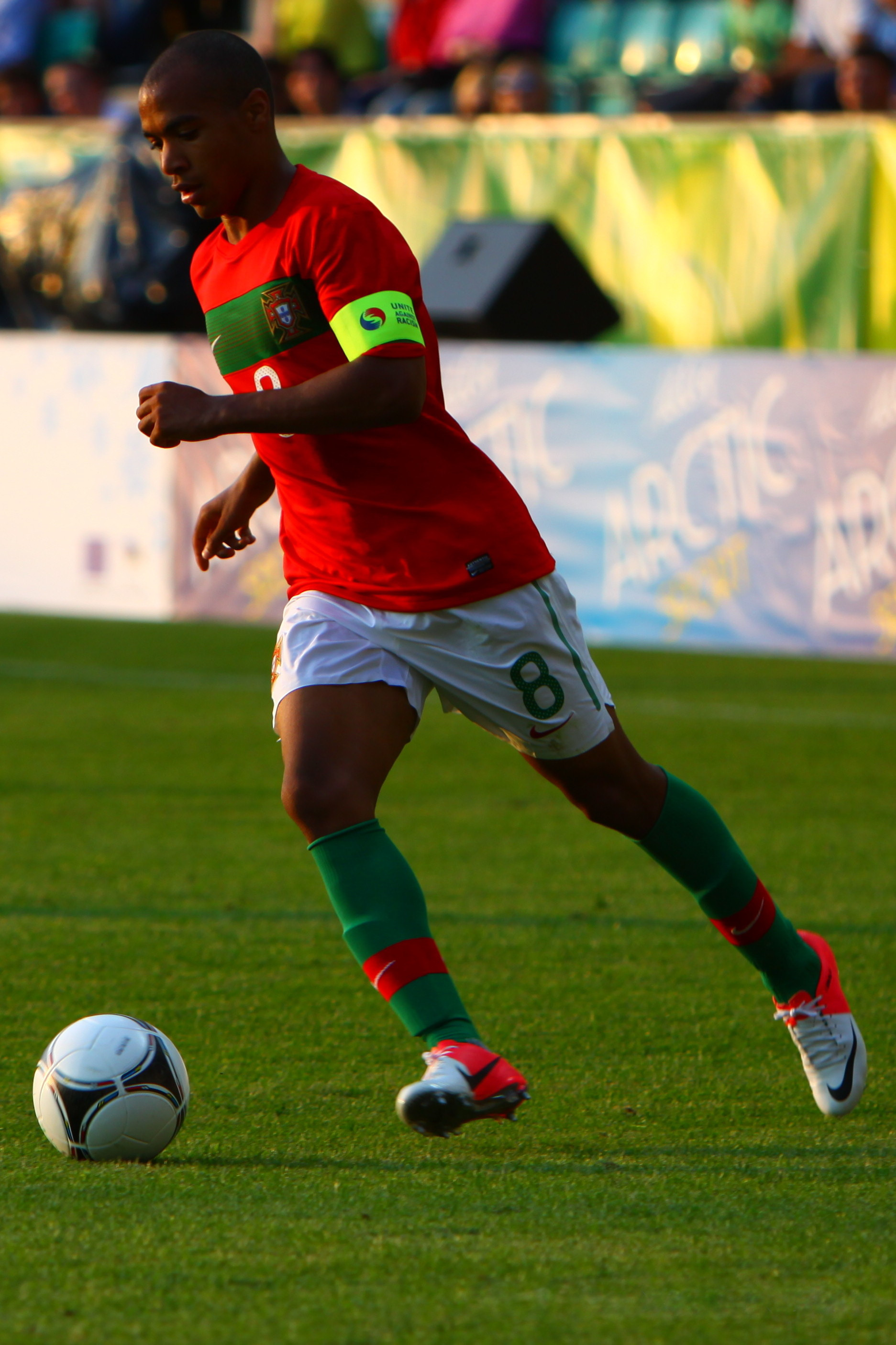 U-19 Portugal vs Spain.